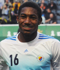 Djurgårdens IF Player Pablo Dyego da Silva Rosa.